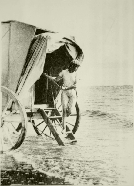 Ein Mann in Badehose steigt aus einem Bade-Karren - 1891A man in a swimsuit gets out of a bathing machine - 1891